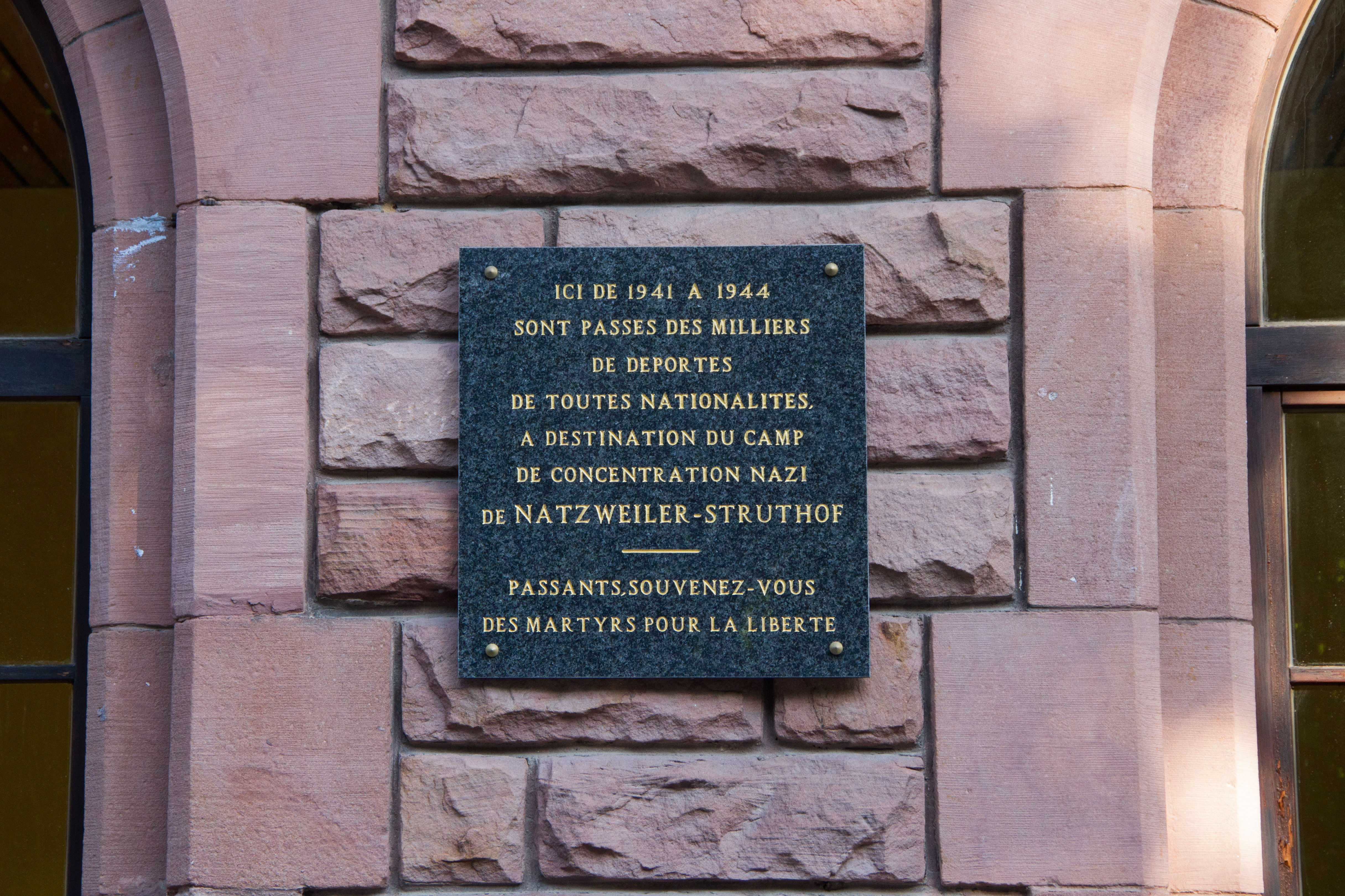 Gare SNCF de Rothau, 15 août 2013